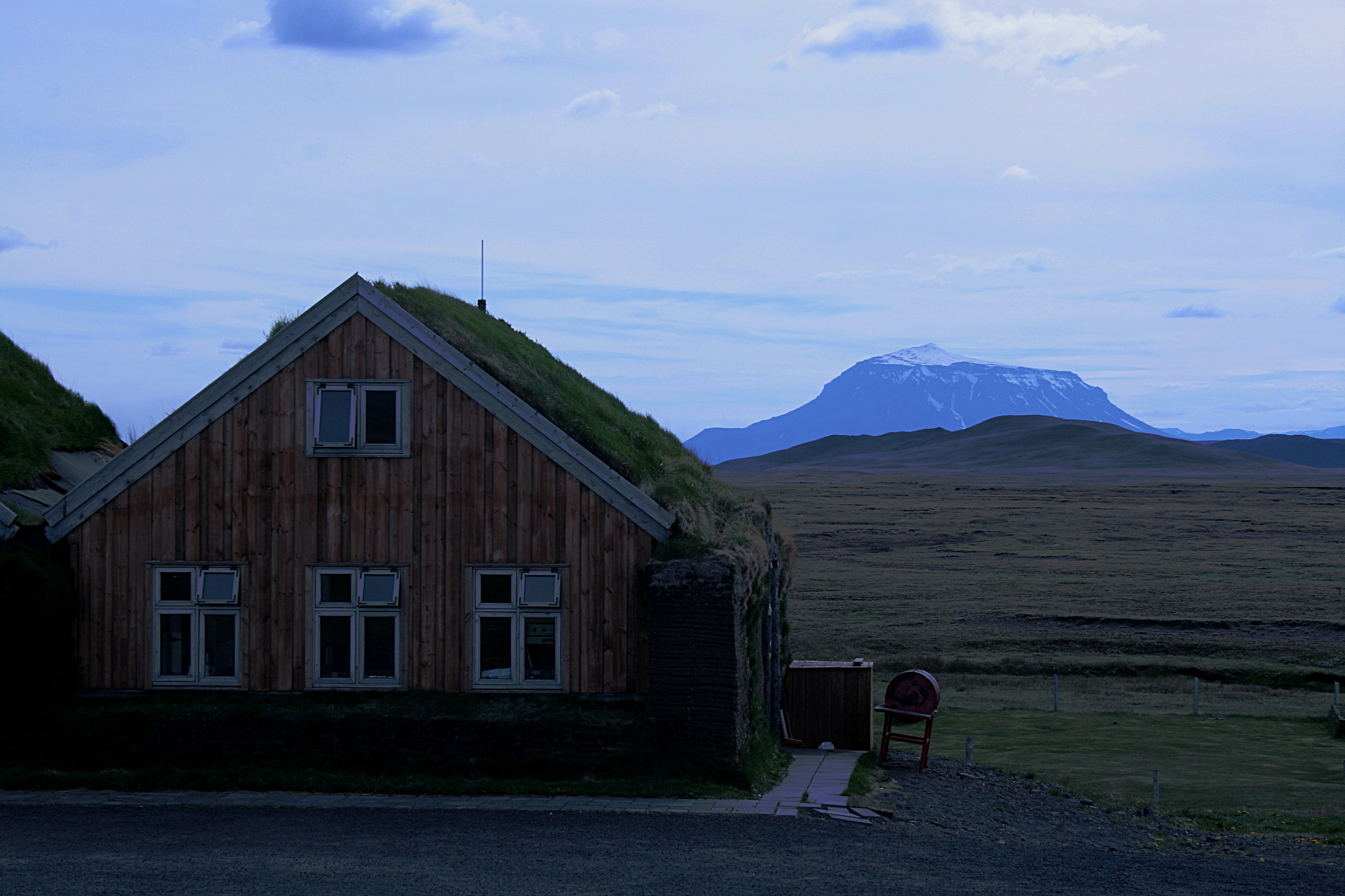 Blick von der Bauernsiedlung Möðrudalur auf den Berg Herðubreið